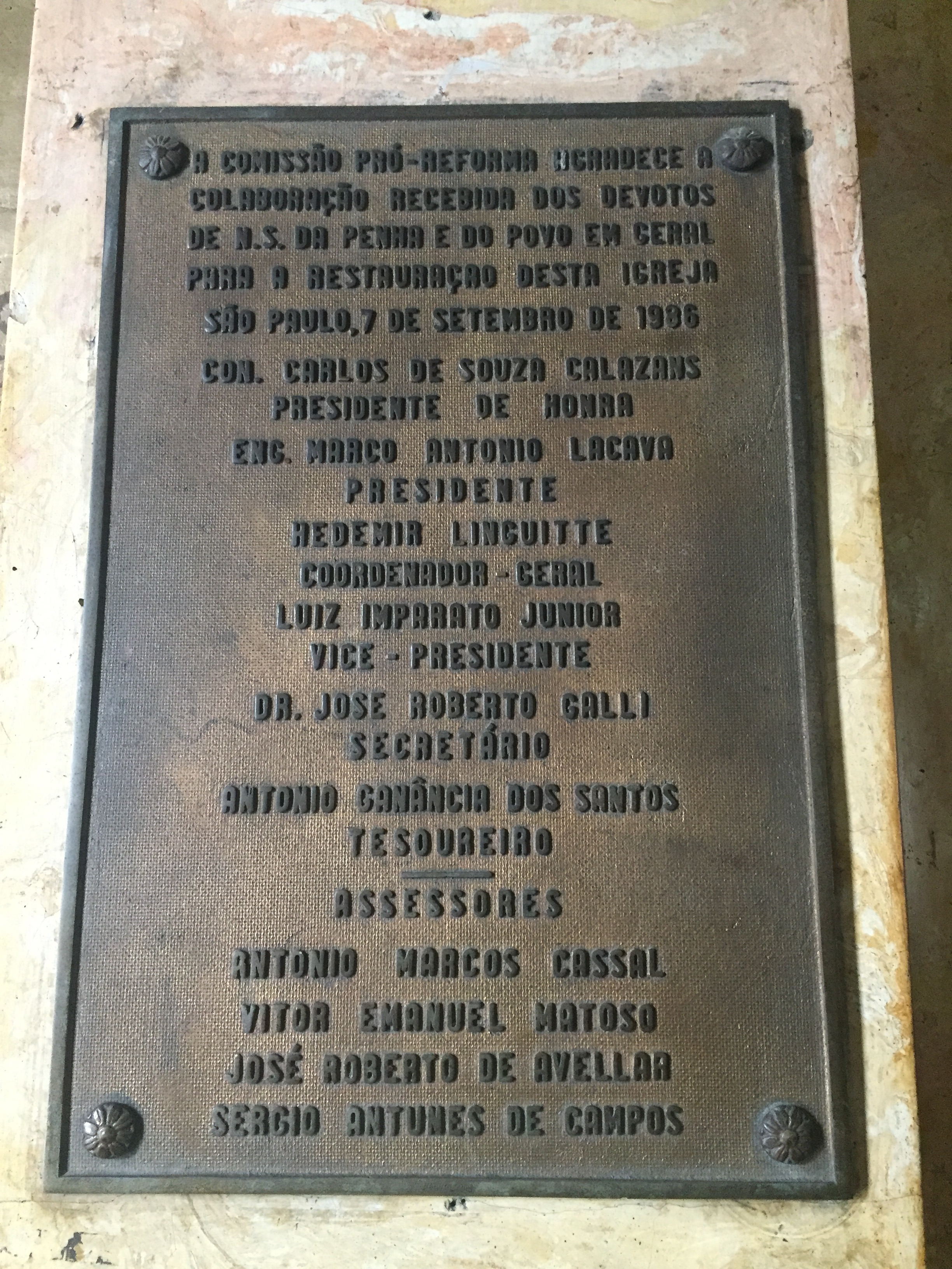 Placa de agradecimento aos devotos na Igreja Matriz de Nossa Senhora da Penha de França, em São Paulo (SP), Brasil